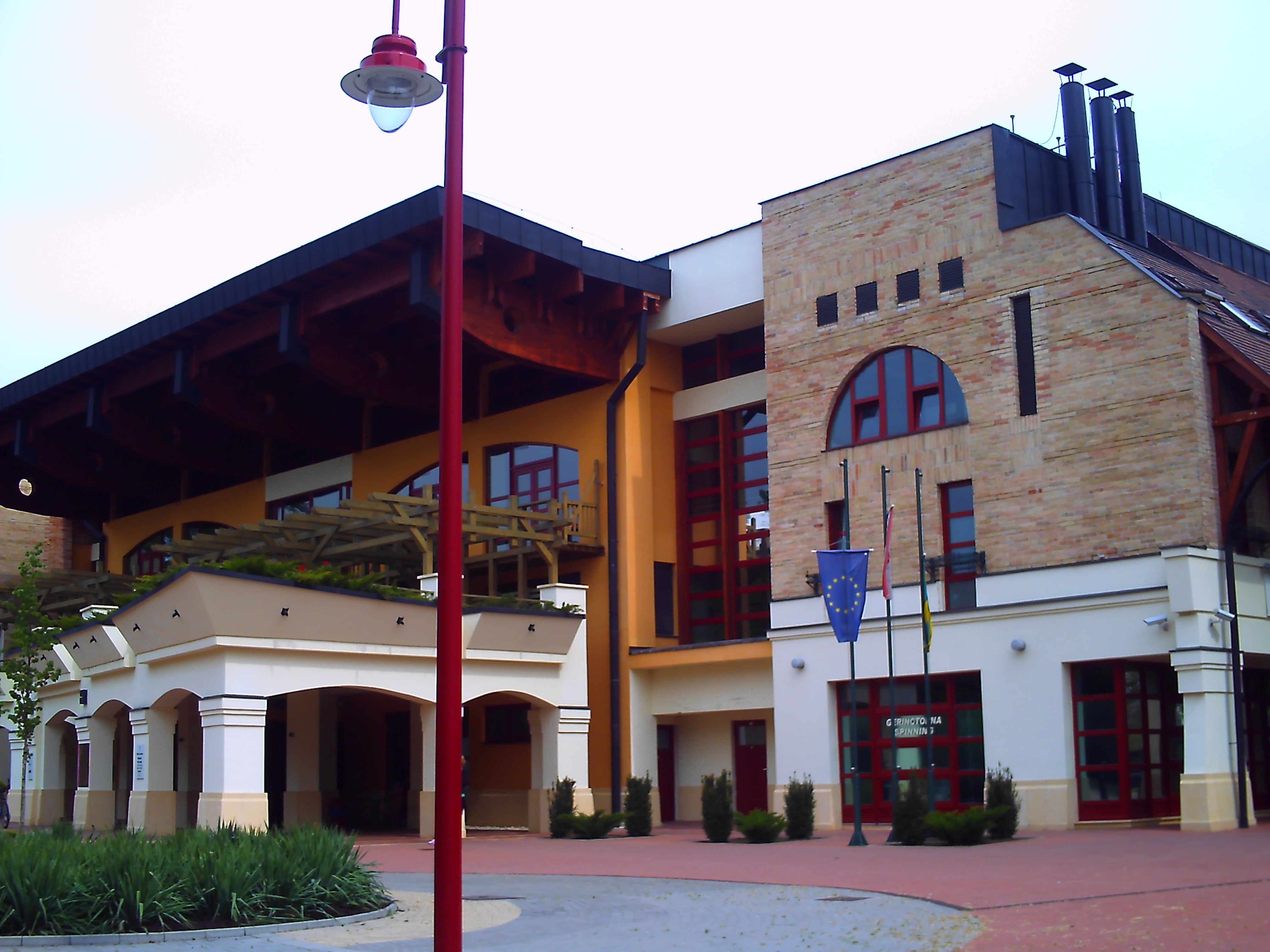 Uszoda, Budapest XVI. kerületében, Mátyásföldön